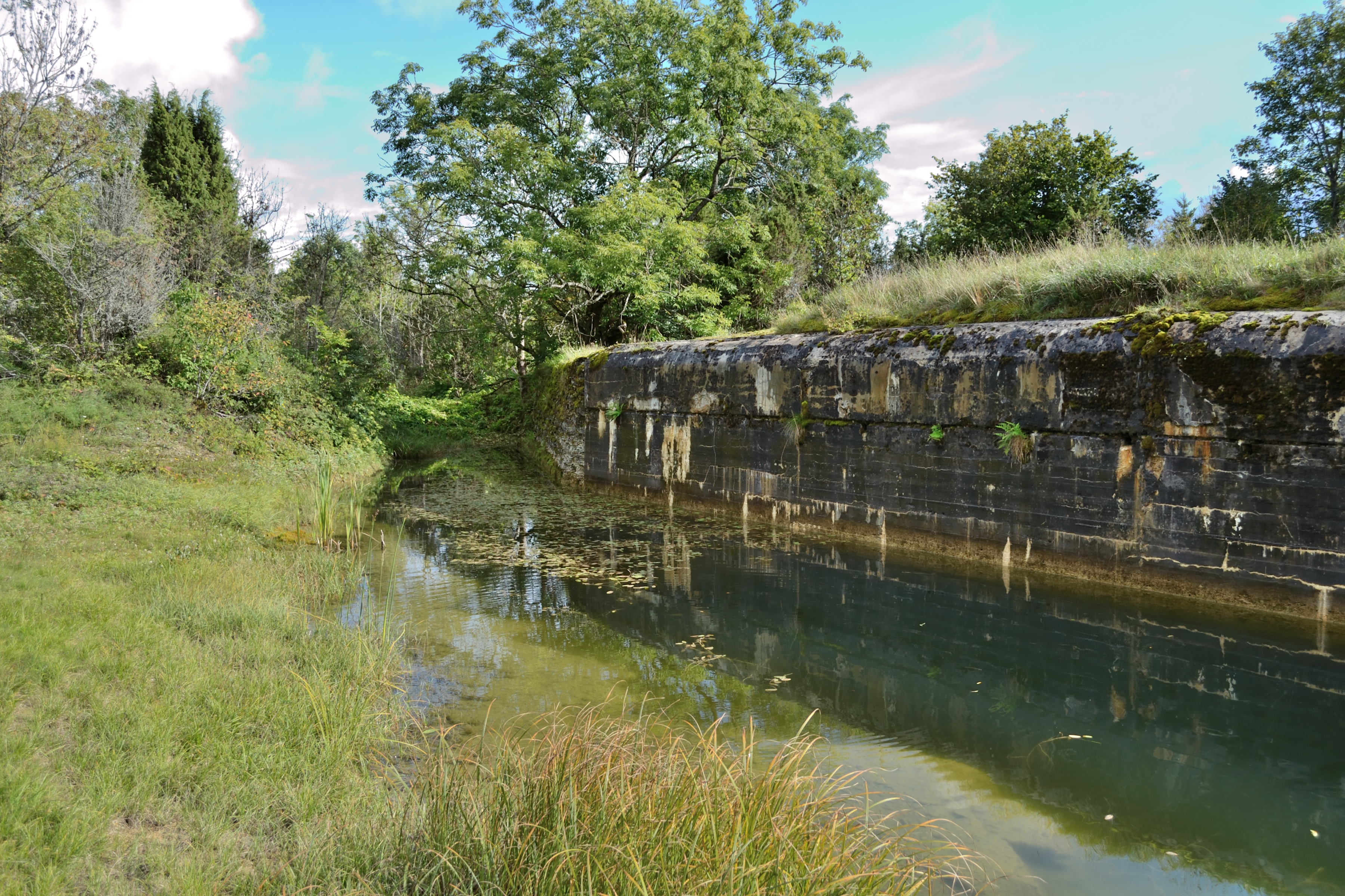 Peeter Suure Merekindluse Vääna-Posti positsiooni rooduvarjend nr 5, 1917